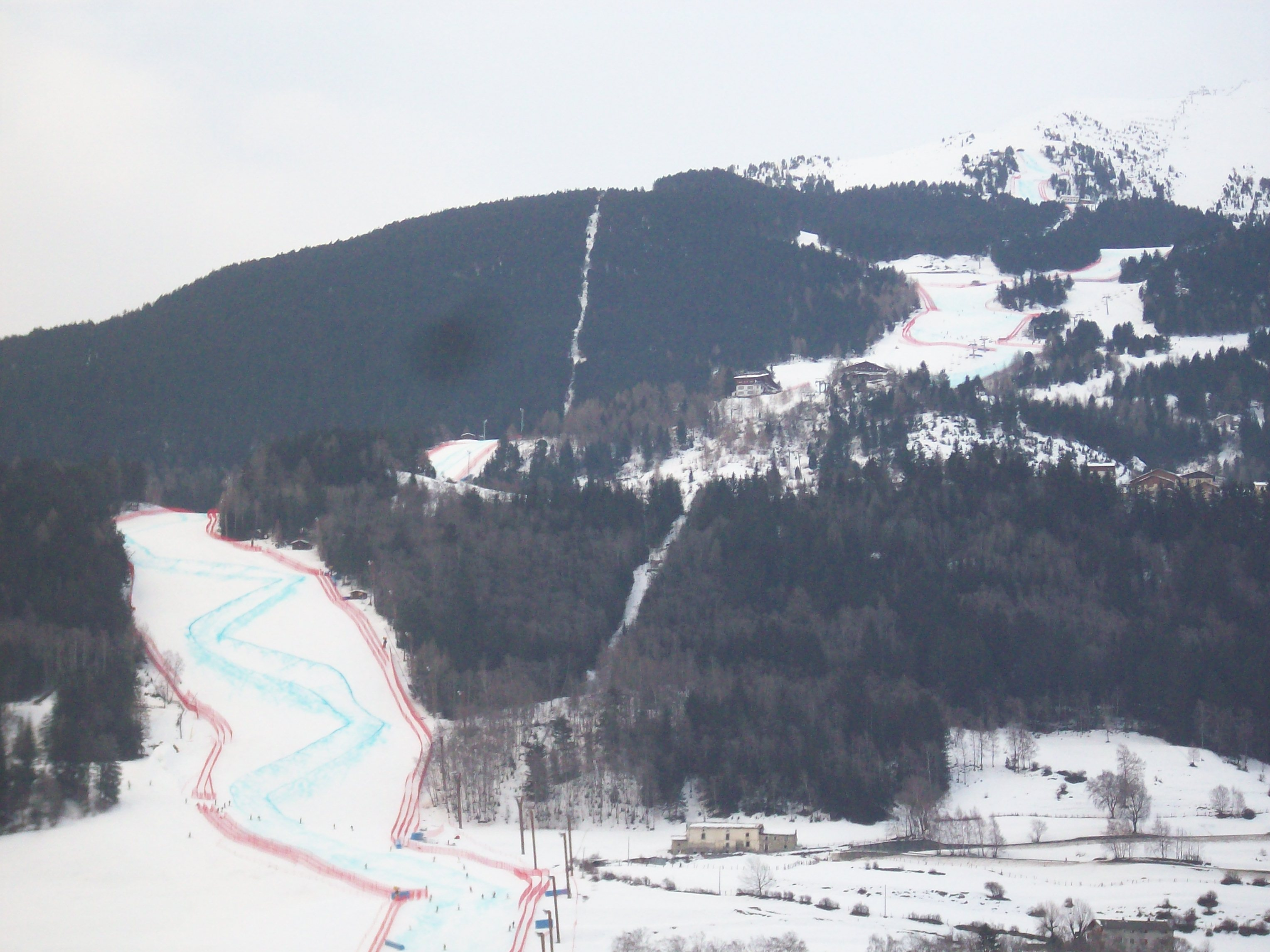 Veduta invernale della pista Stelvio di Bormio con disegnato il tracciato della libera di coppa del mondo di sci.